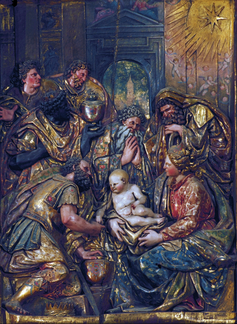 Tafallako eliza, errege magoen gurtza